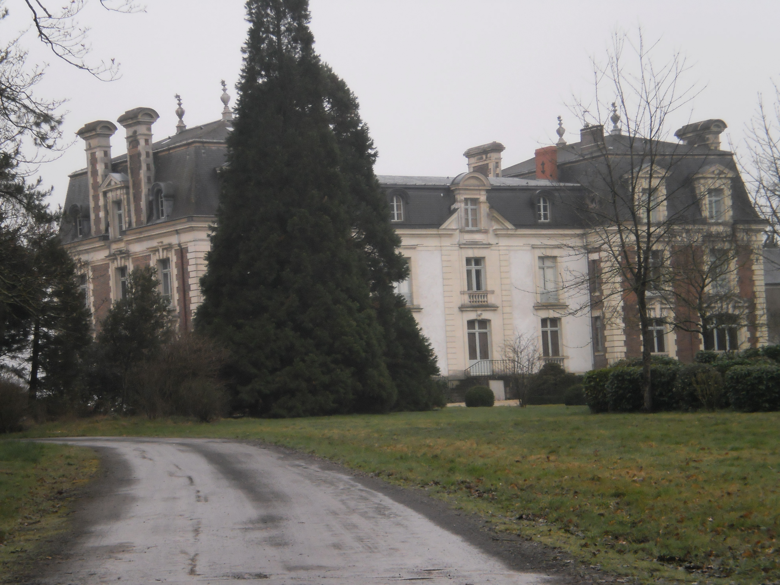 La Chapelle-Saint-Sauveur (Loire-Atlantique, France) - château de la Jaillère